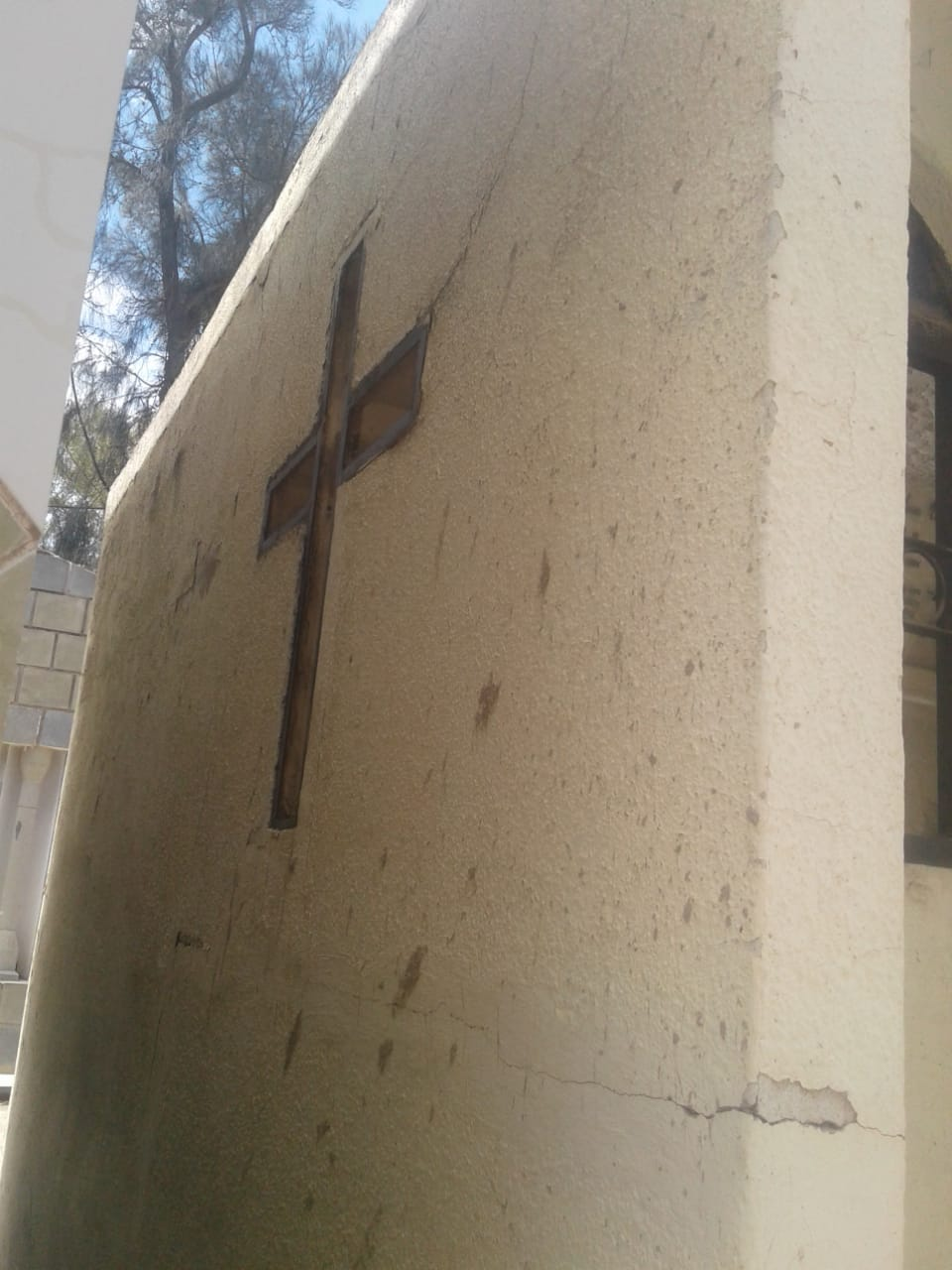 cruz latina en el muro de la izquierda